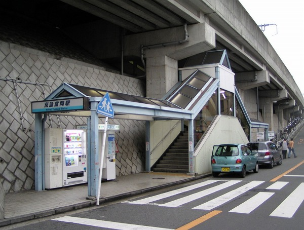 京急富岡駅西口（神奈川県横浜市） 2006年5月2日午後3時35分 (JST) ごろ投稿者が撮影。